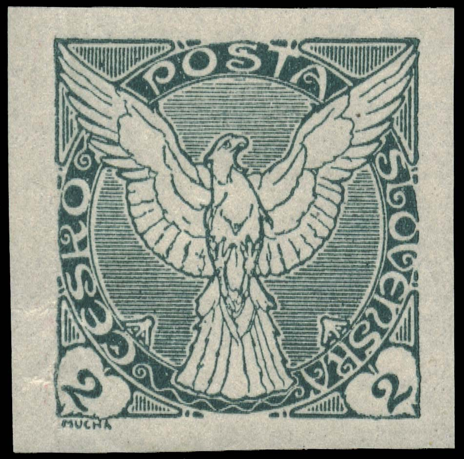 Первая газетная марка Чехословакии